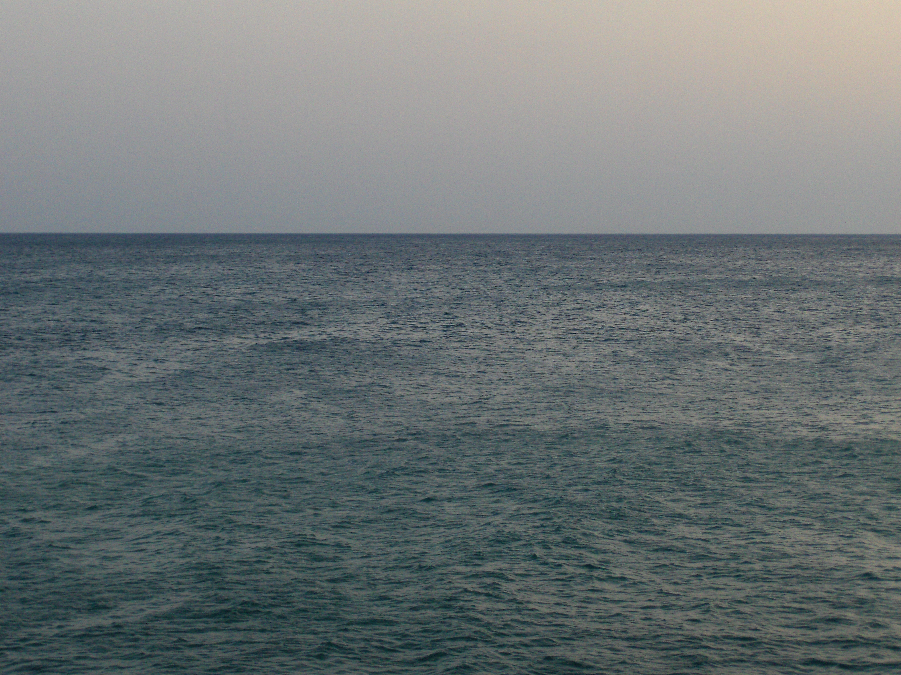 Agua del Mediterráneo